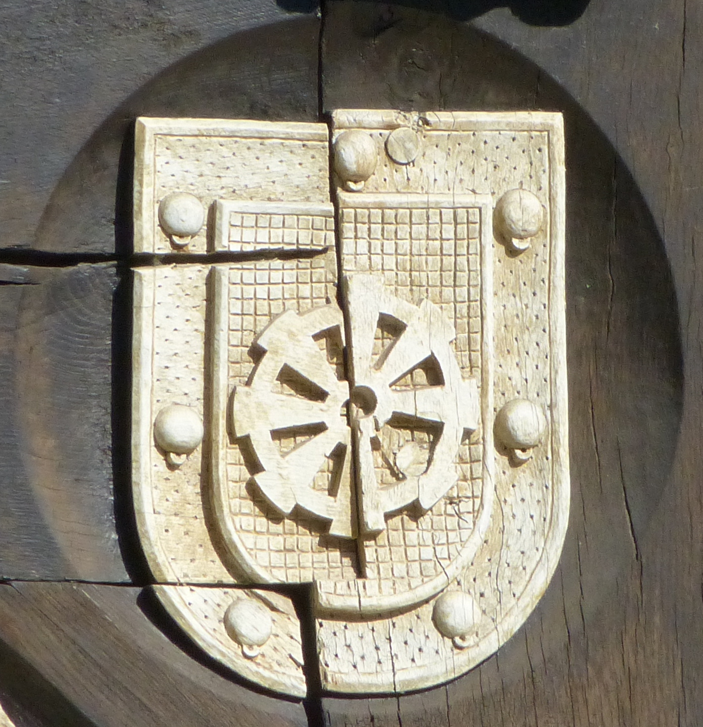 Haus Kränholm in Bremen, Auf dem Hohen Ufer 35A; Wappen Knoop (Garnhaspel) am Portal der SüdseiteDas abgebildete Objekt ist ein geschütztes Kulturdenkmal in der Freien Hansestadt Bremen, mit der Nr. 1883 beim Landesamt für Denkmalpflege registriert.